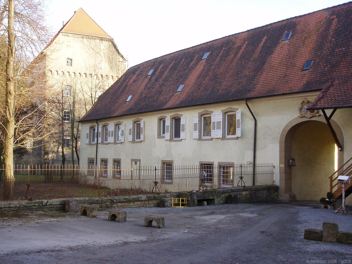 Wirtschaftsgebäude beim Schloss in Bad Rappenau-Grombach